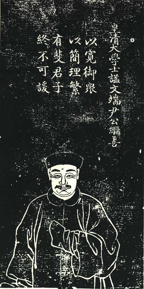 尹继善（1694年－1771年），字元长，号望山，章佳氏，满洲镶黄旗人。尹泰之子。清朝政治人物。官至文华殿大学士。